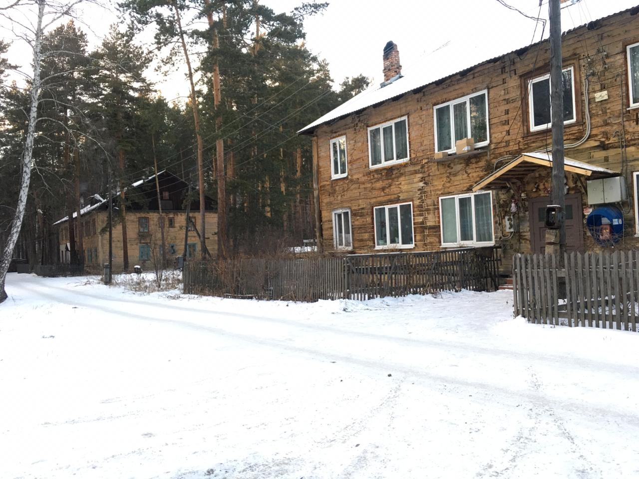 Вид на посёлок Акуля в Кыштымском городском округе